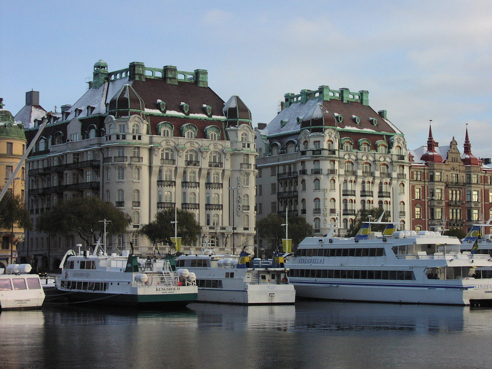 Strandvägen 7.Walking along the Strandvägen